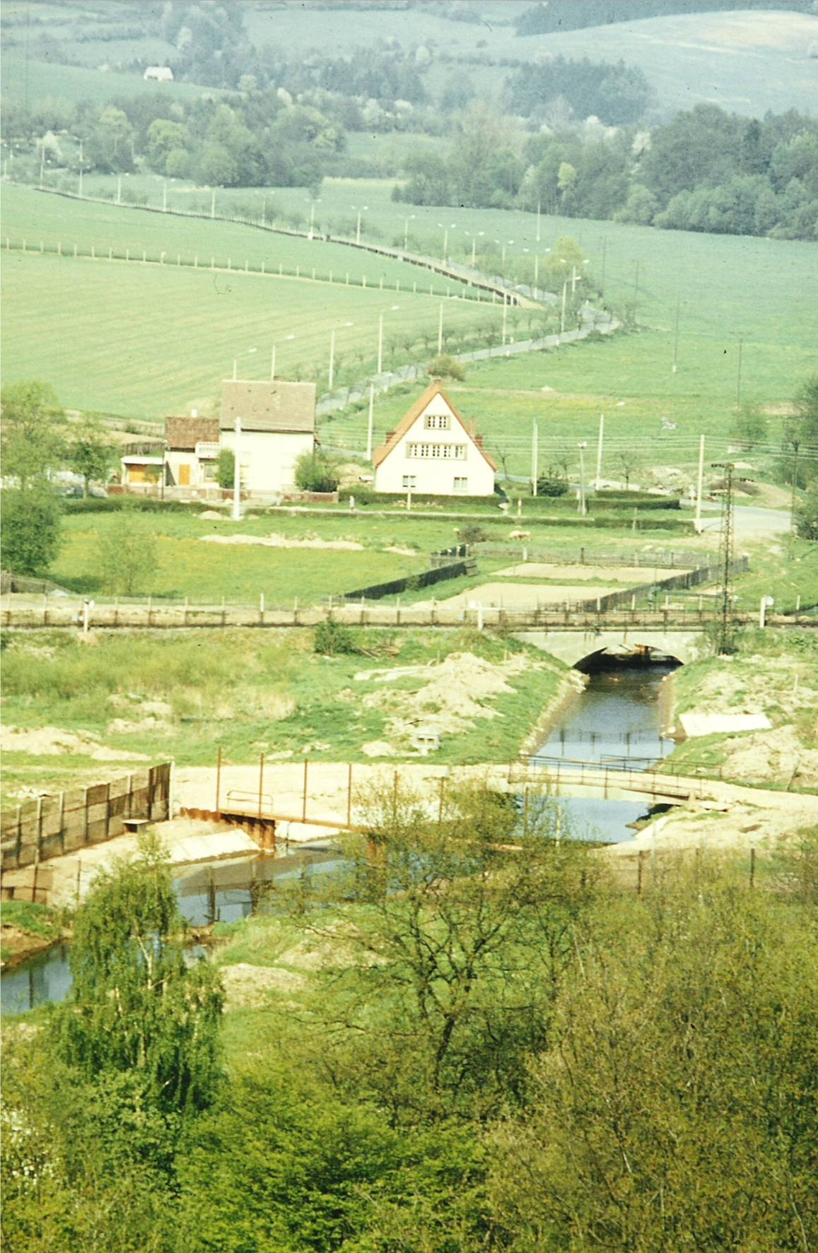 Sperranlagen in Zwinge vor der ehemaligen Bahnstrecke am Zusammenfluss von Geröder und Weilröder Eller